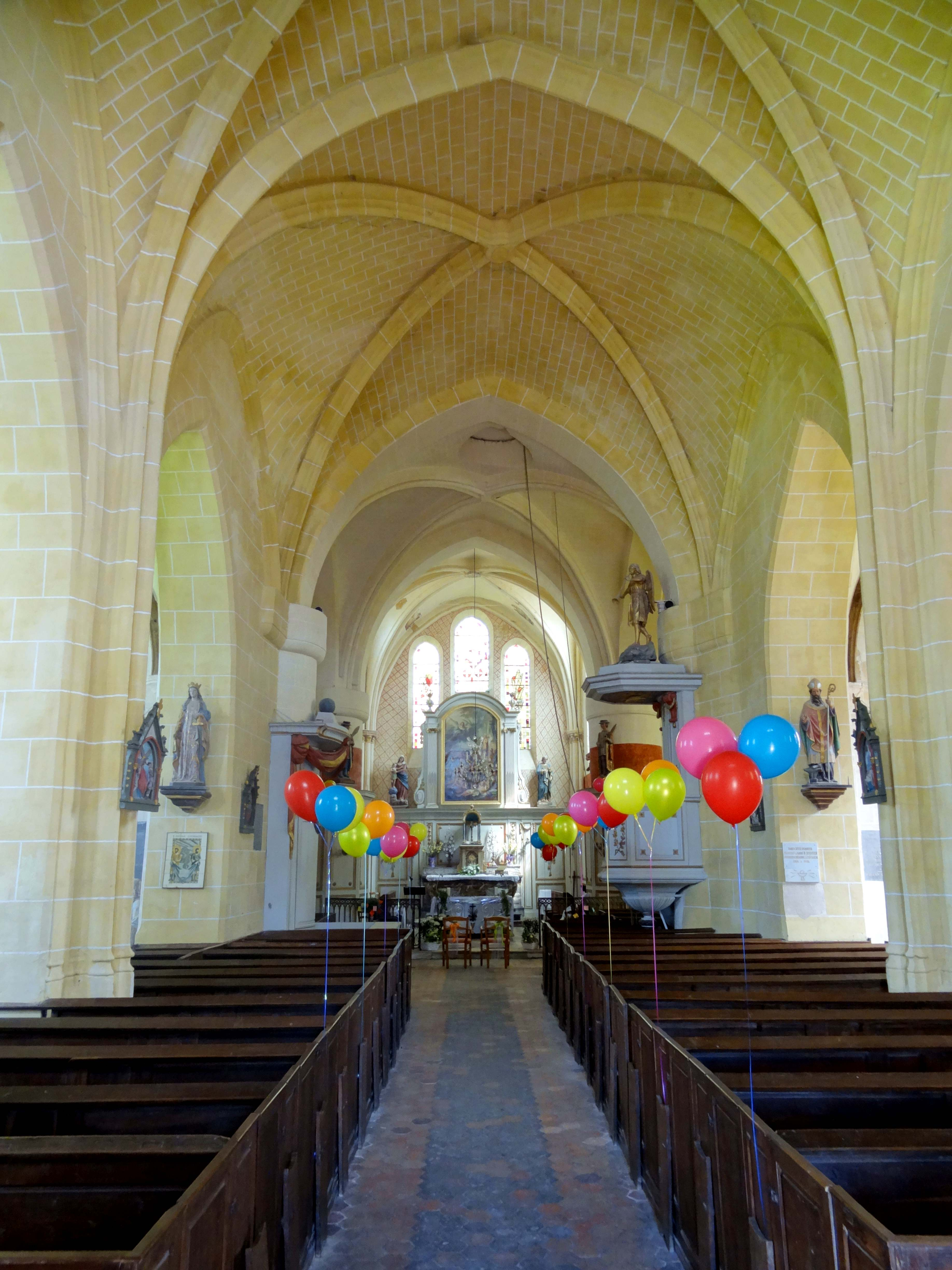 Intérieur de l'église - voir titre.